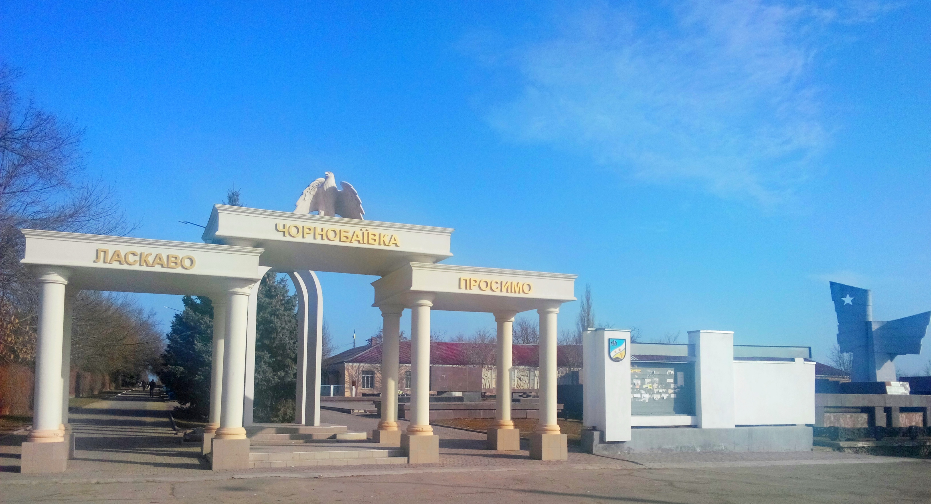 Чорнобаївка. Центр (Білозерський район)